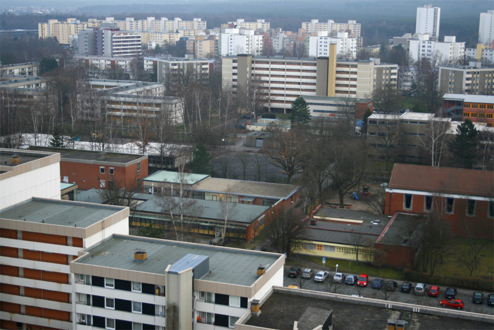 Teil der Plattenbausiedlungen in Langwasser Mitte (Nürnberg) aus den späten 60er Jahren des 20.Jhr.